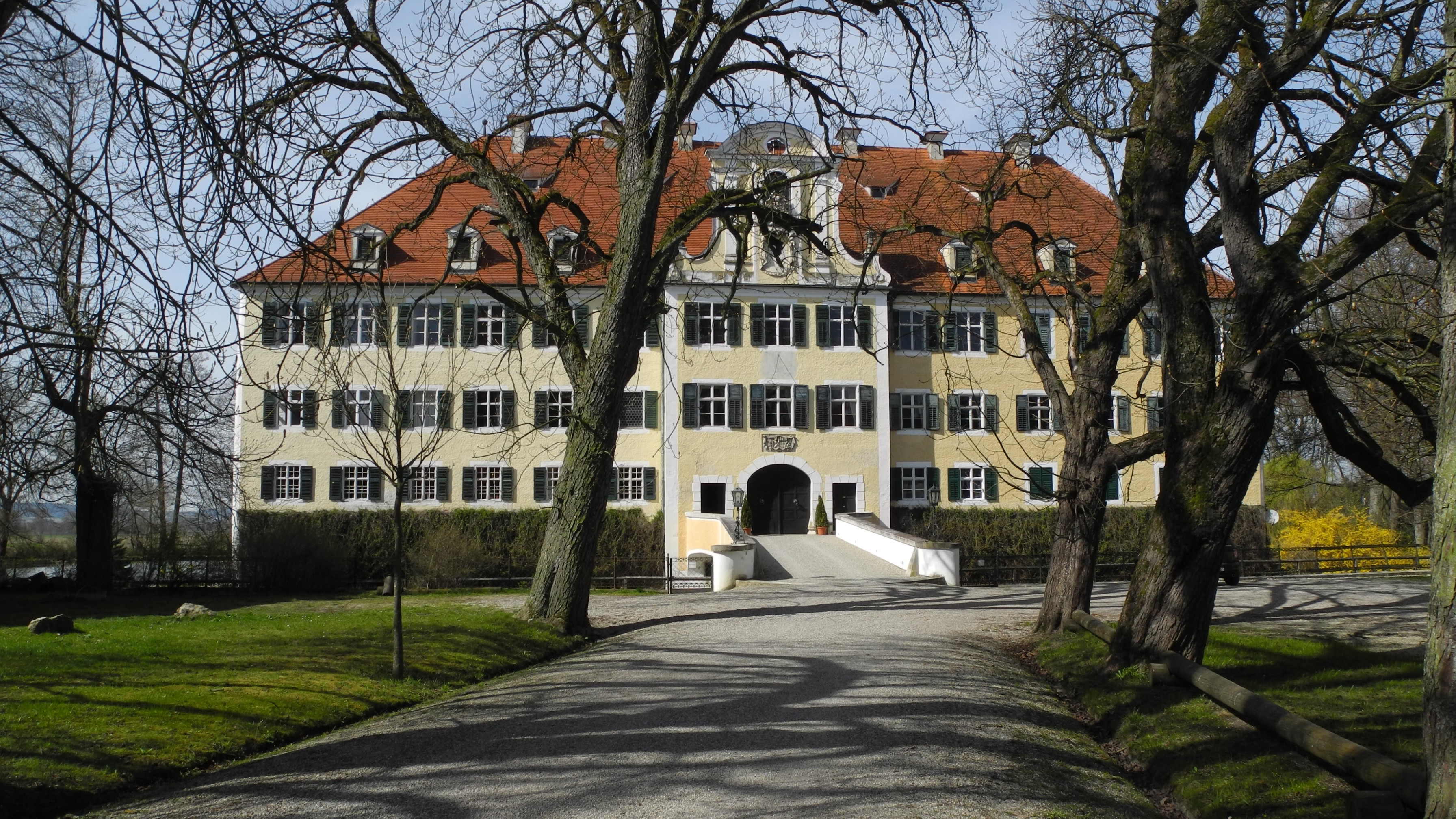 Schrobenhausen-Schloss Sandizell